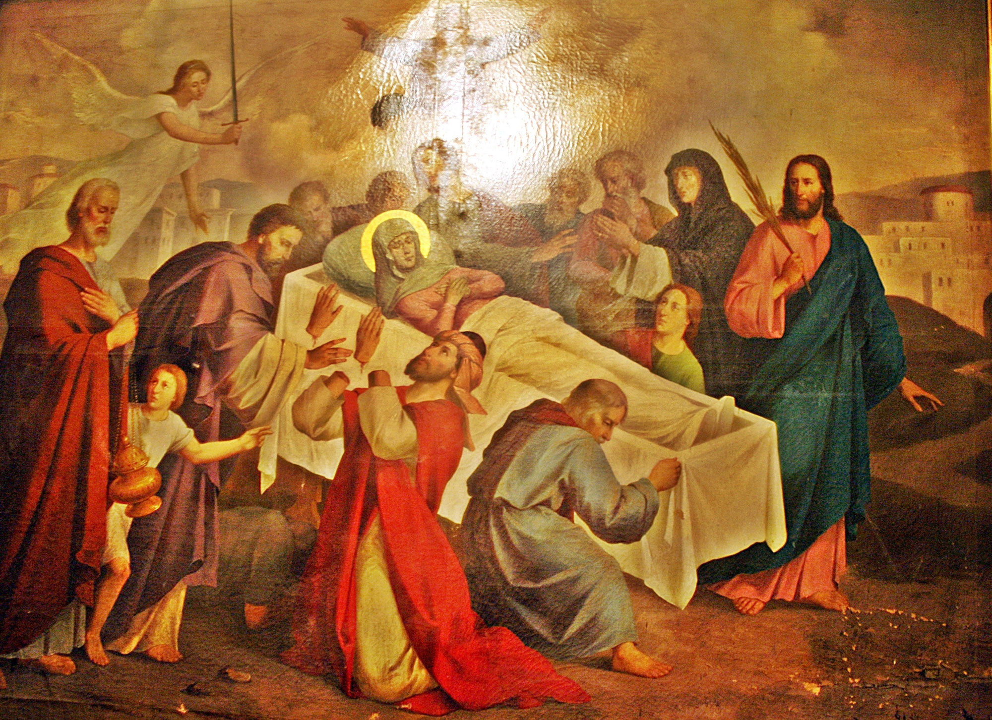 Icoană din Biserica Sfântului Nicolae din Șcheii Brașovului